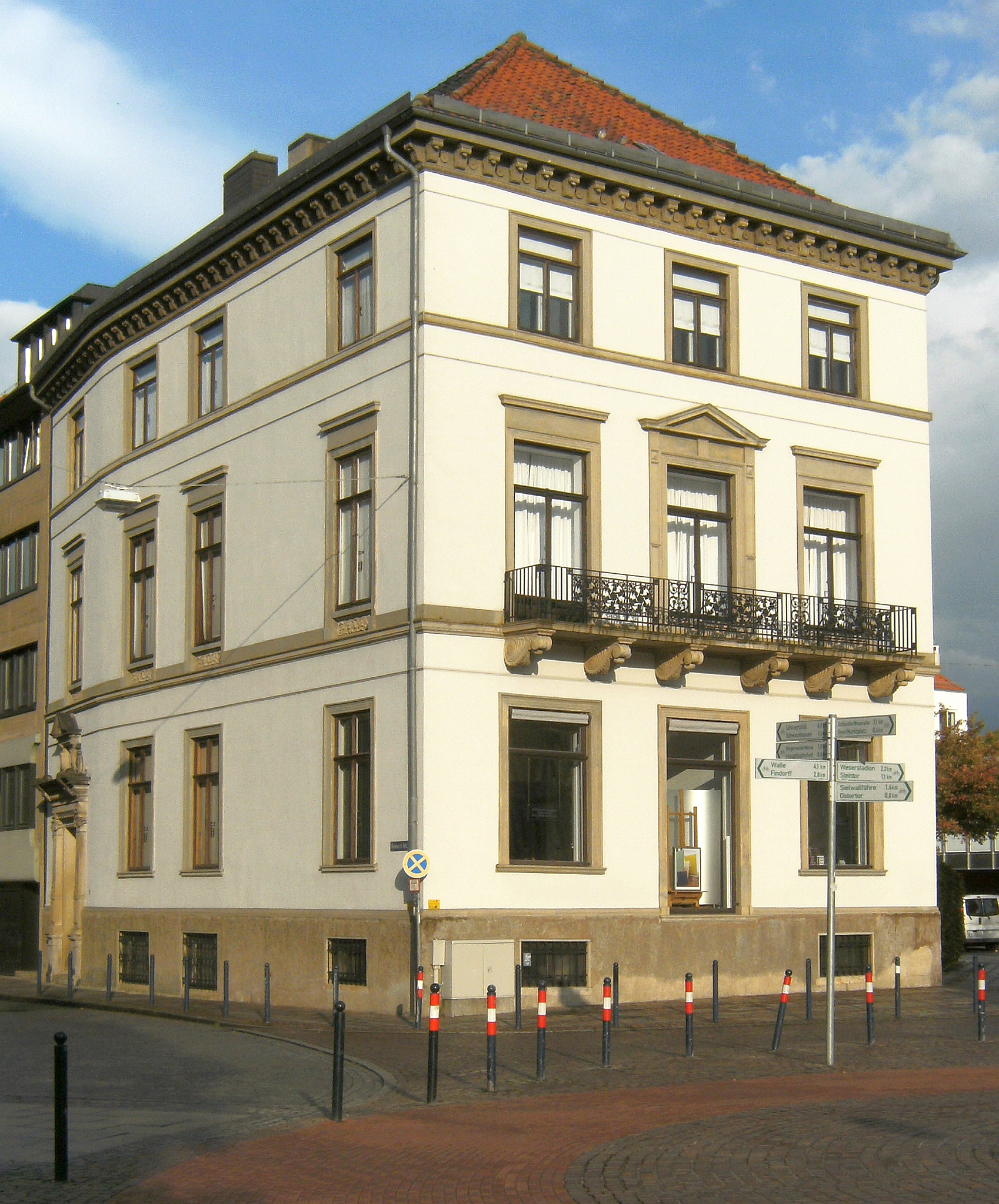 Wohnhaus in Bremen, Rembertistraße 1A.Das abgebildete Objekt ist ein geschütztes Kulturdenkmal in der Freien Hansestadt Bremen, mit der Nr. 1028 beim Landesamt für Denkmalpflege registriert.